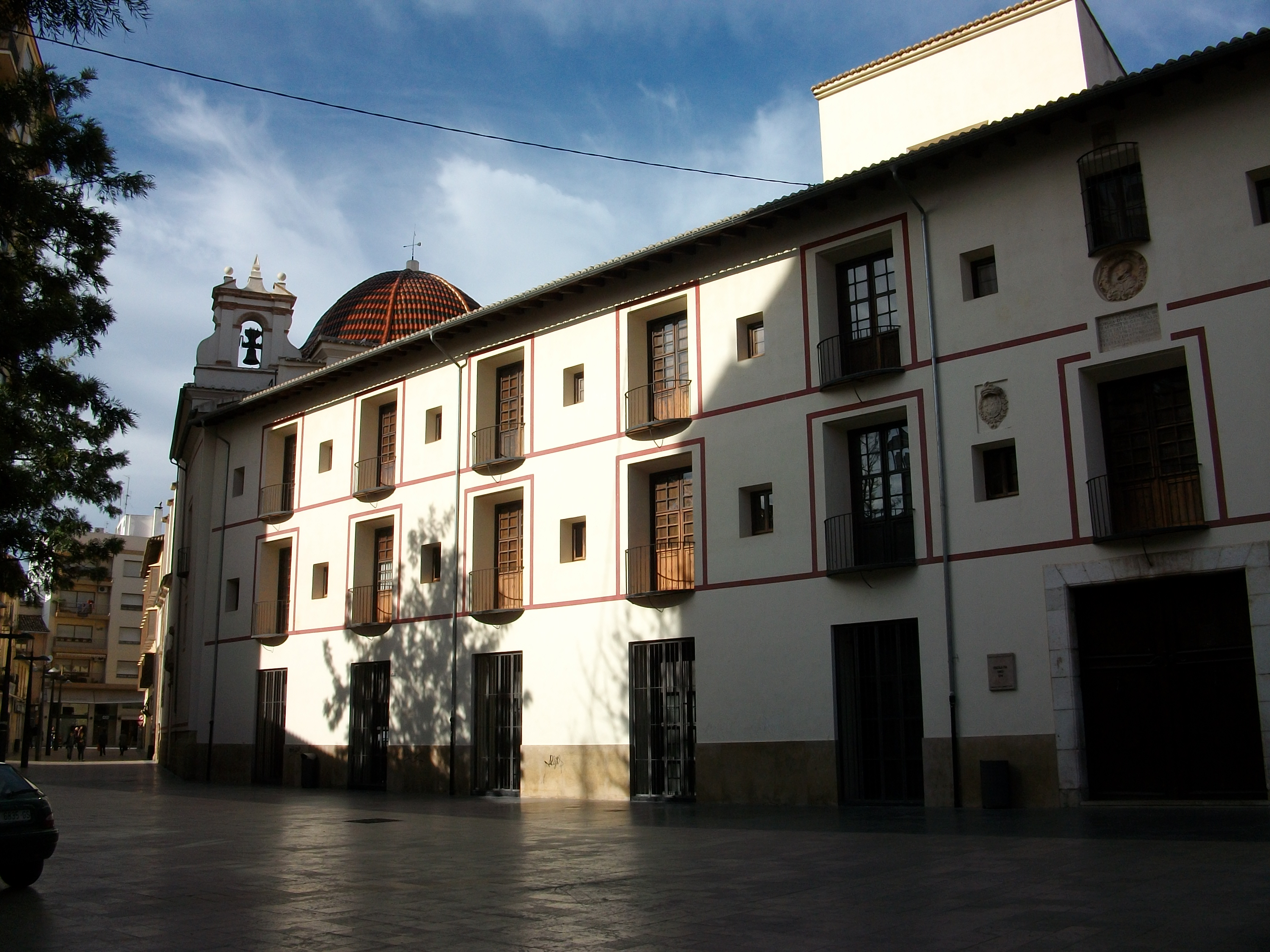 Escoles Pies de Gandia, antiga Universitat.